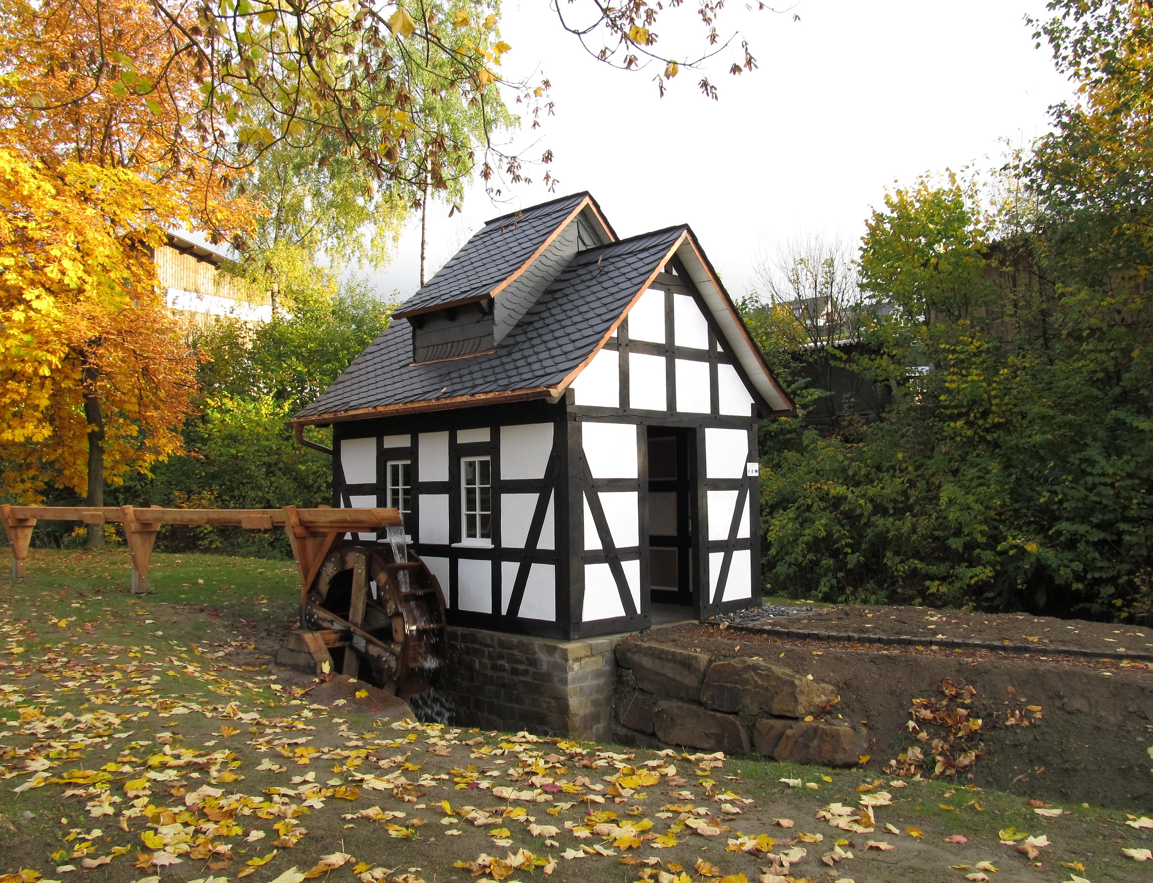 Wasserrad mit Fachwerkgebäude am Mühlenplatz (nahe der ehemaligen Kornmühle Heimes) in Schmallenberg-Grafschaft (Germany)